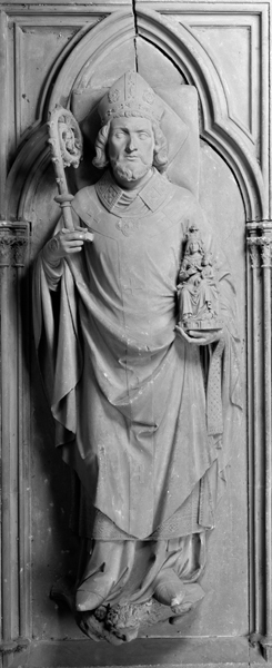 Rainald von Dassel († 1167) auf dem Hochgrab im Kölner Dom, Kalksteinfigur von Alexander Iven (1854–1934)